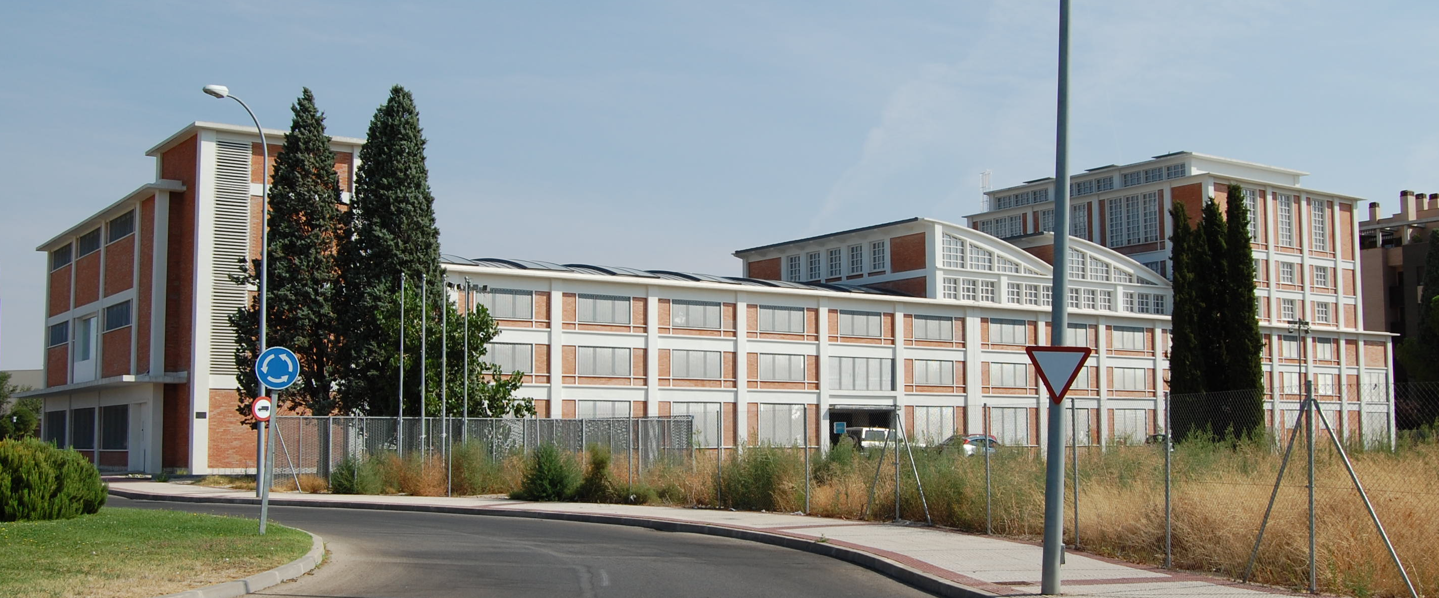 Fachada sur de la antigua fábrica de Perfumería Gal en Alcalá de Henares (Comunidad de Madrid - España). Diseñada por el arquitecto Manuel Sainz de Vicuña y García-Prieto en 1960.